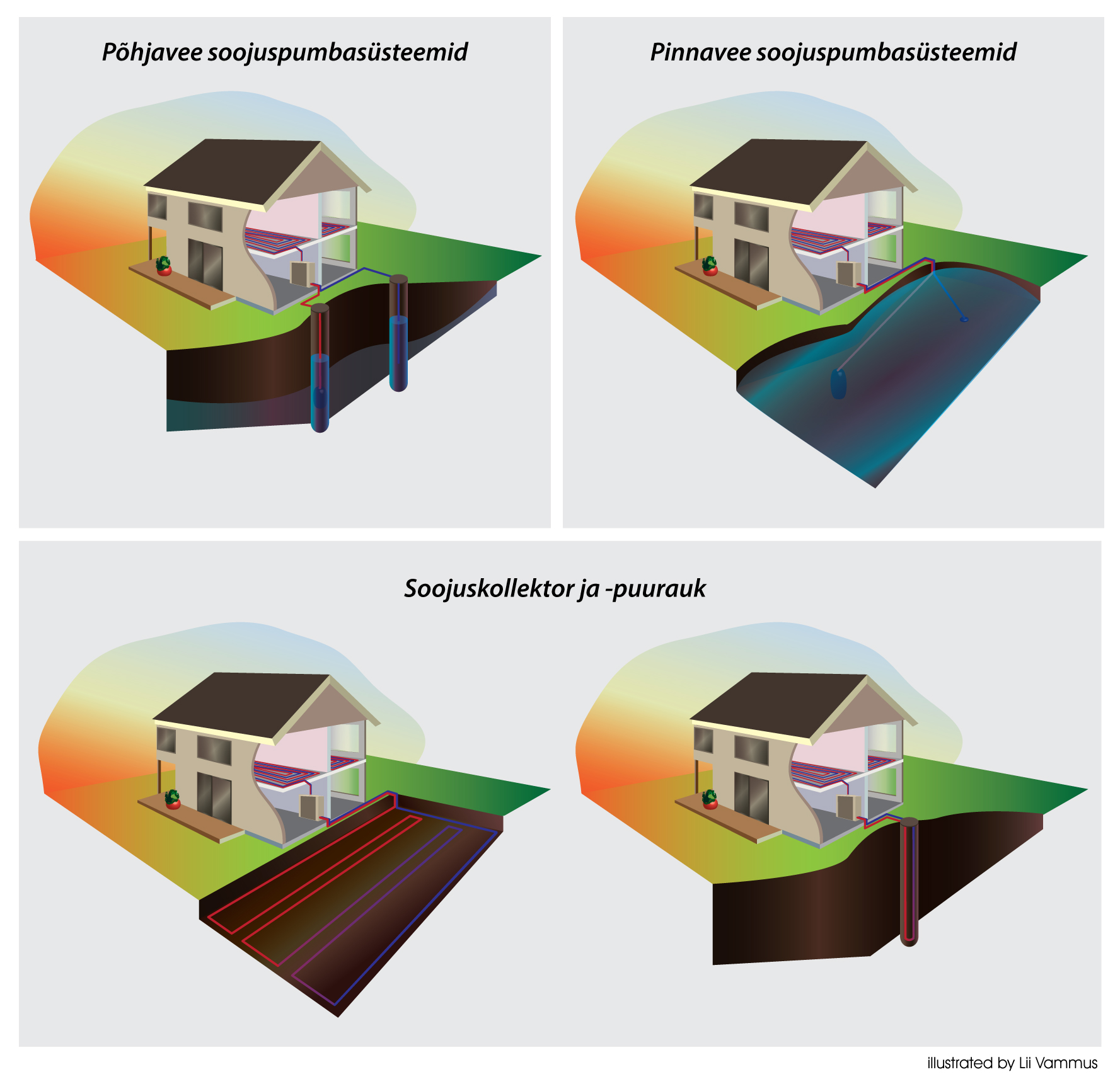 maasoojussüsteemid